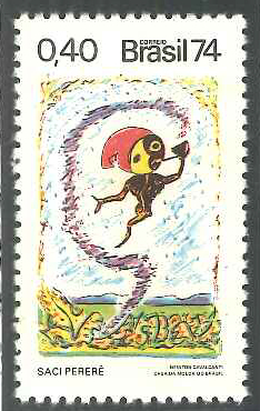 Emissão comemorativa dos Correios, realizada em Fevereiro de 1974, para divulgação das Lendas Brasileiras